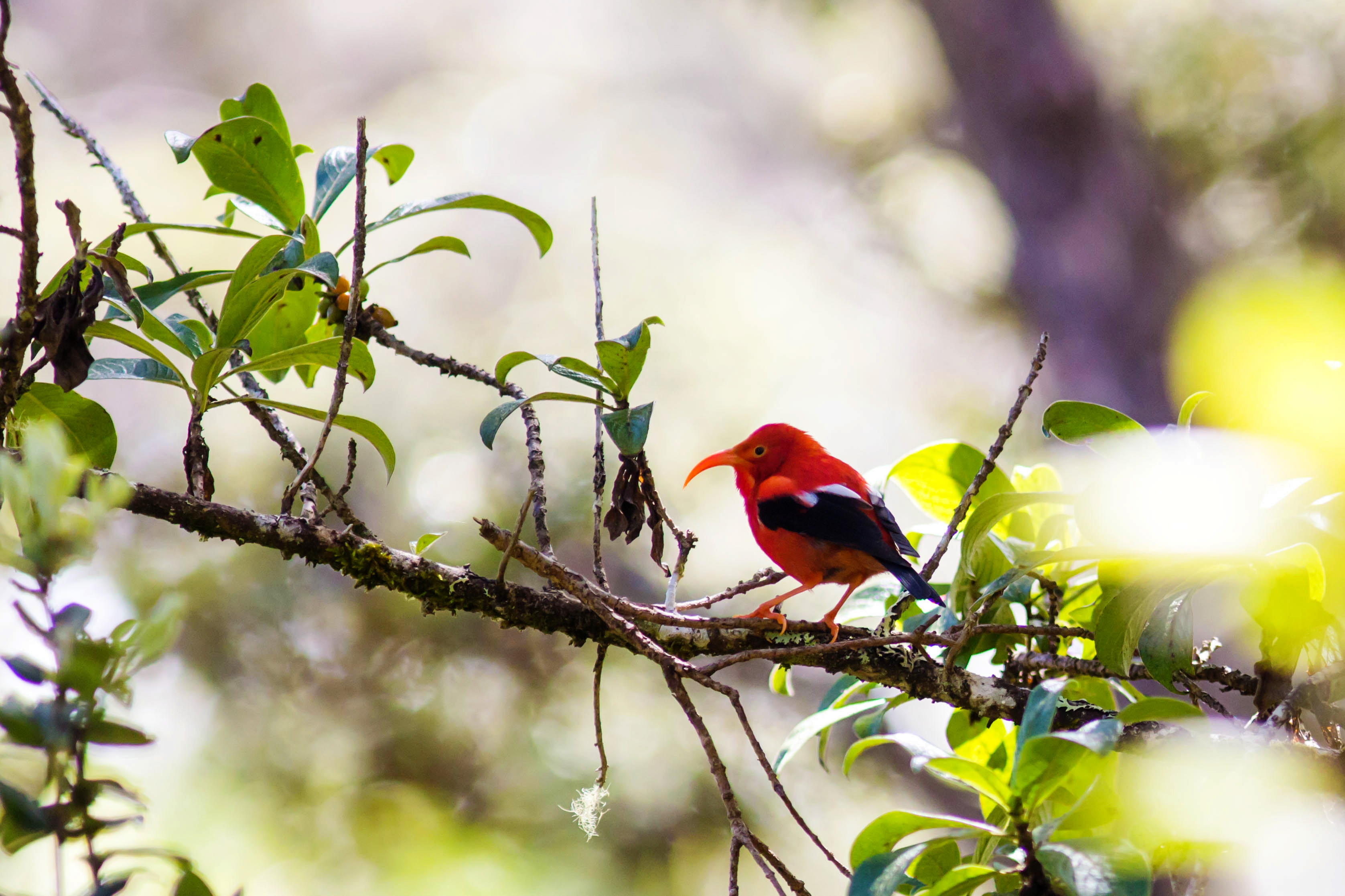 'I'iwi